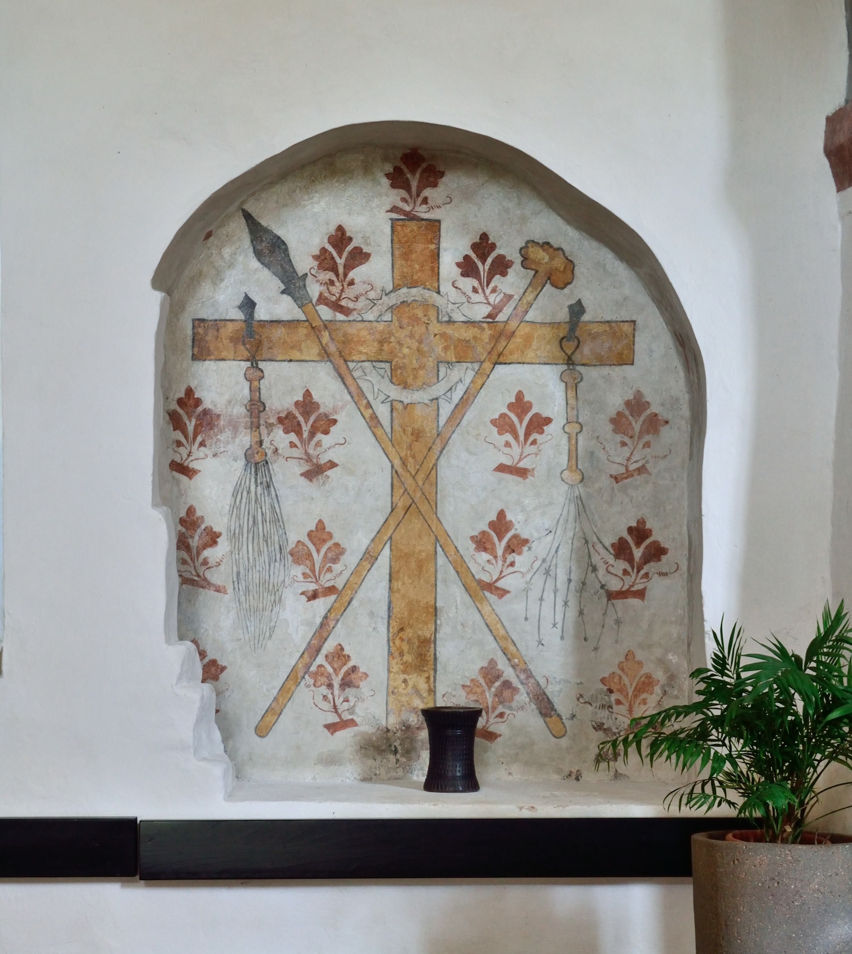 Evangelische Kirche Detmold-Heiligenkirchen Leidenswerkzeug als Wandmalerei